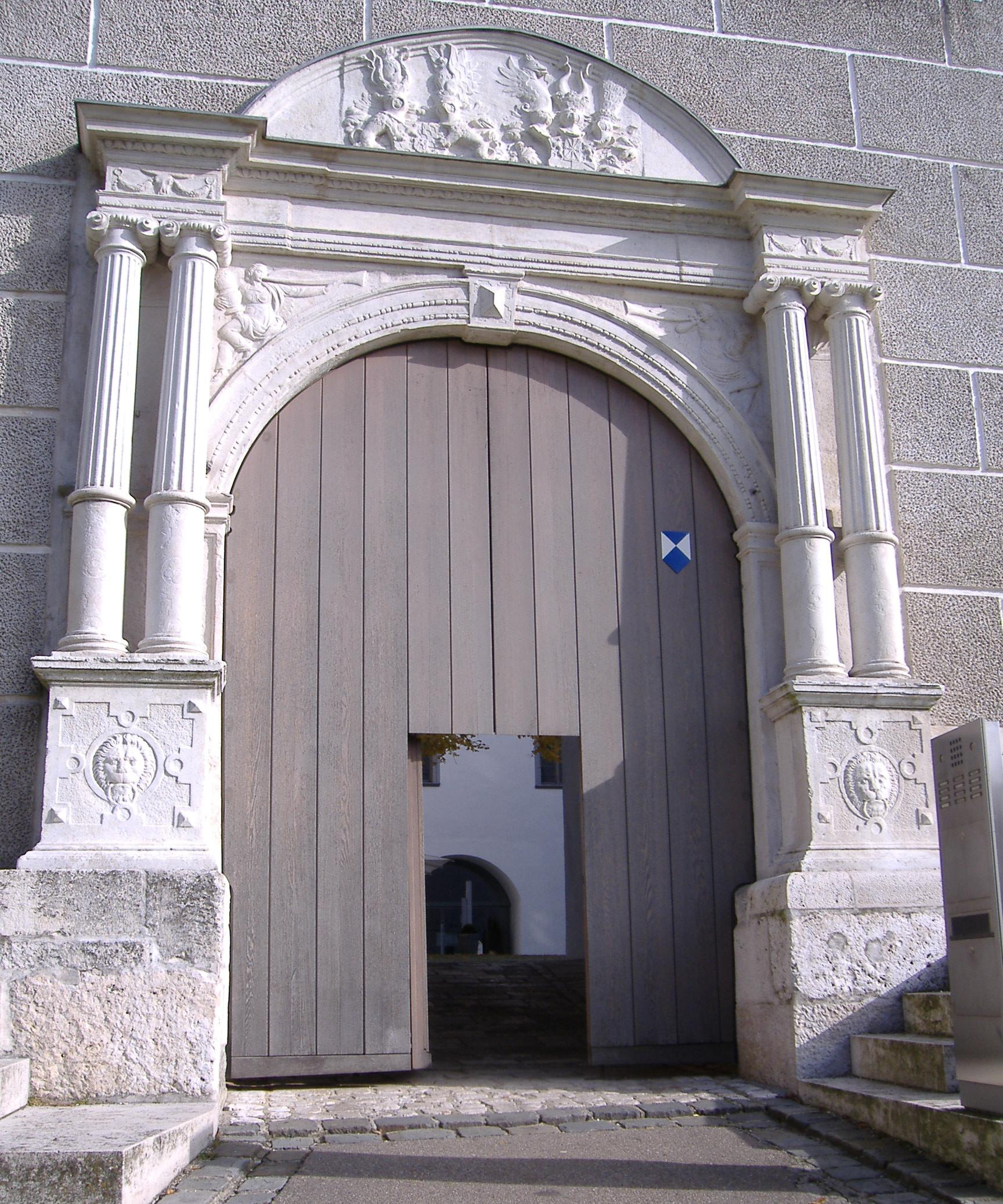 Höchstädt